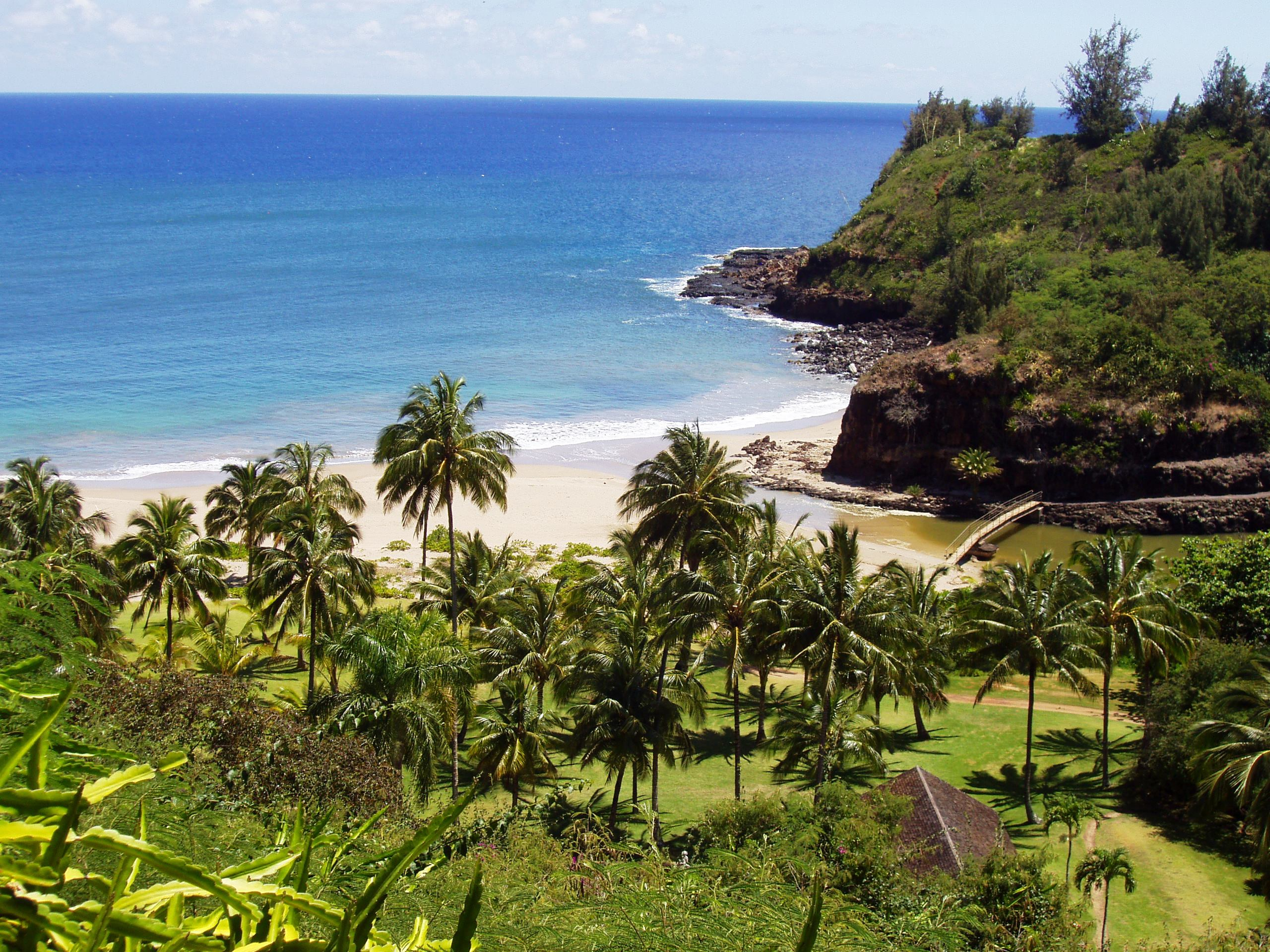 Allerton Garden, Kauai, Hawaii - view down into valley.